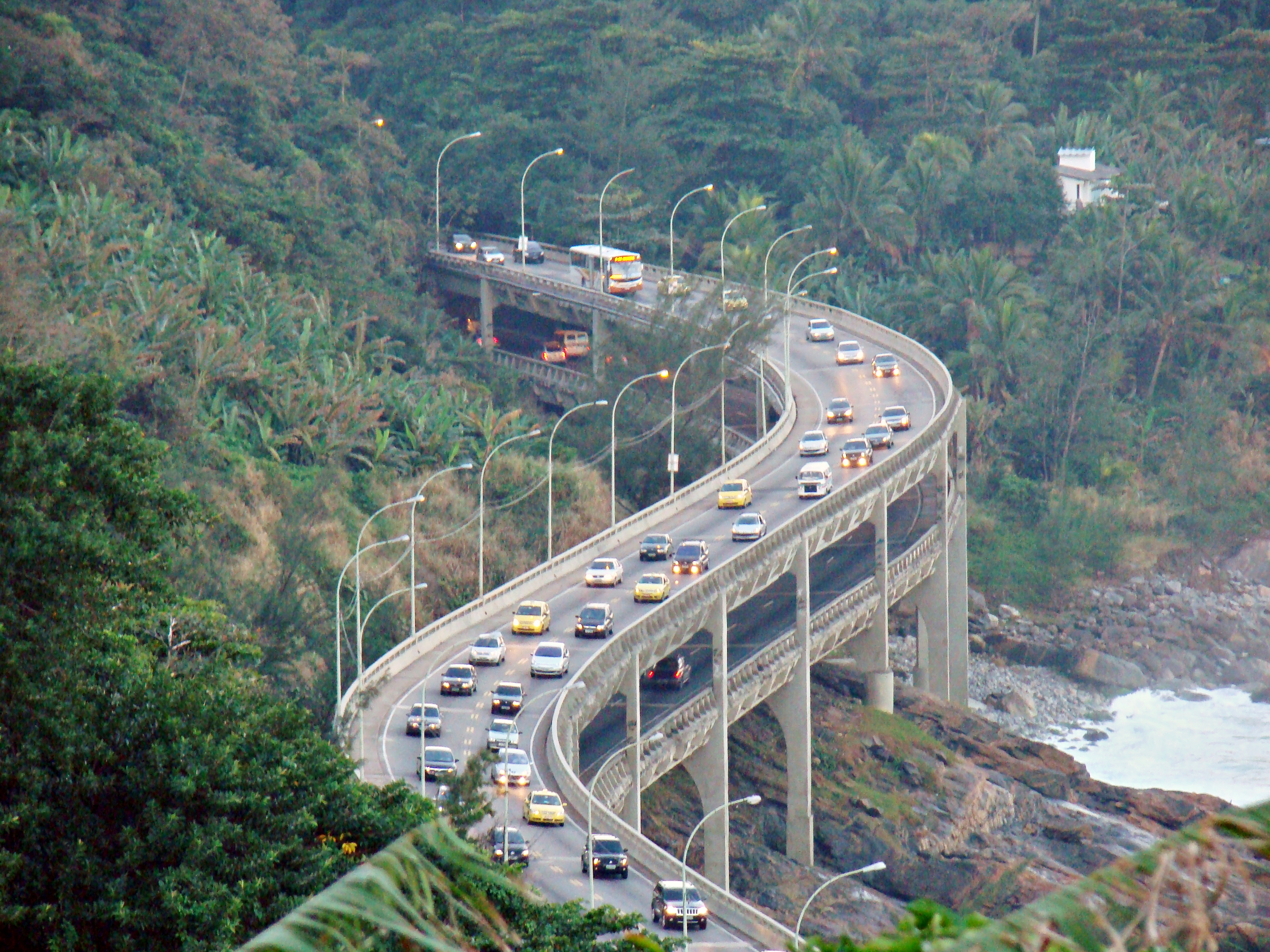 Rio de Janeiro Brasil